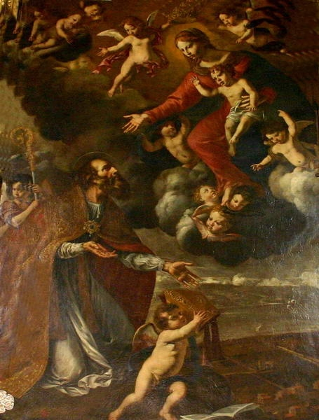 Church Messina Chiesa di Santa Rita